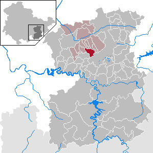 Grobengereuth in Thuringia - Saale-Orla-Kreis